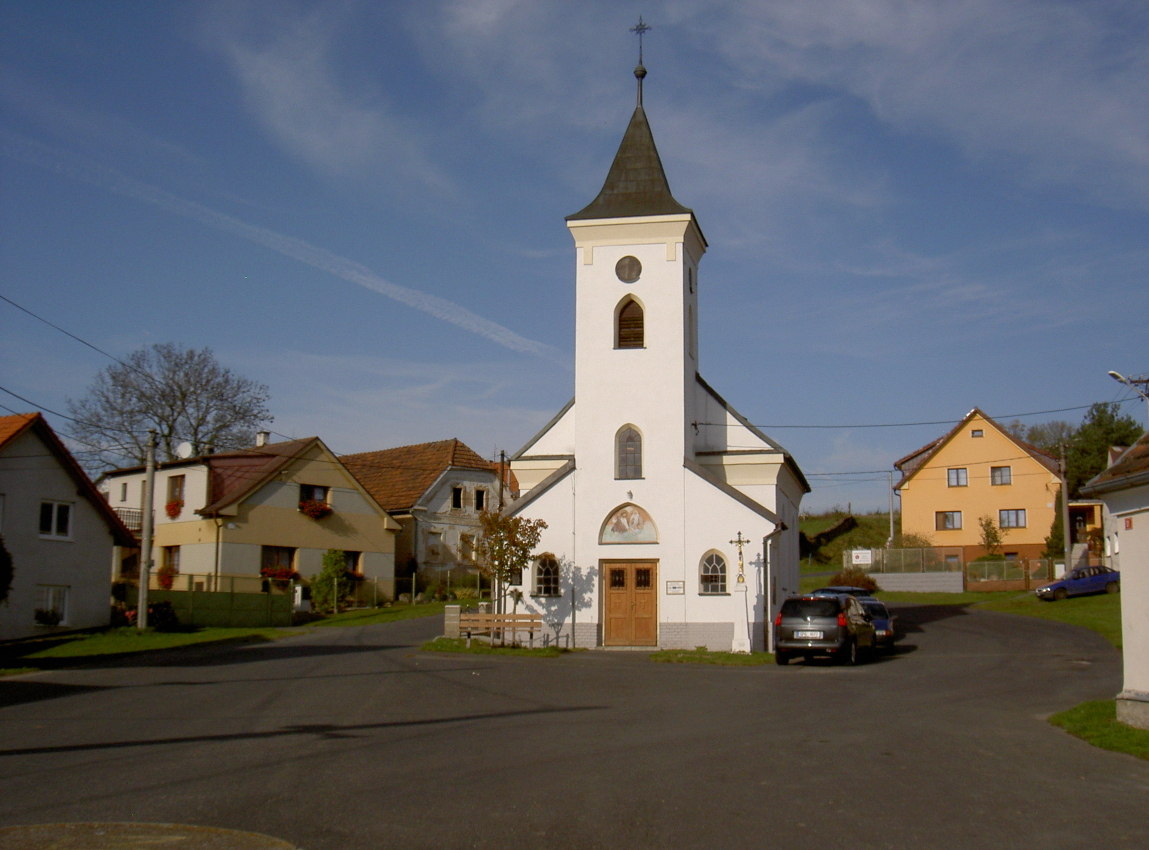 Luženice